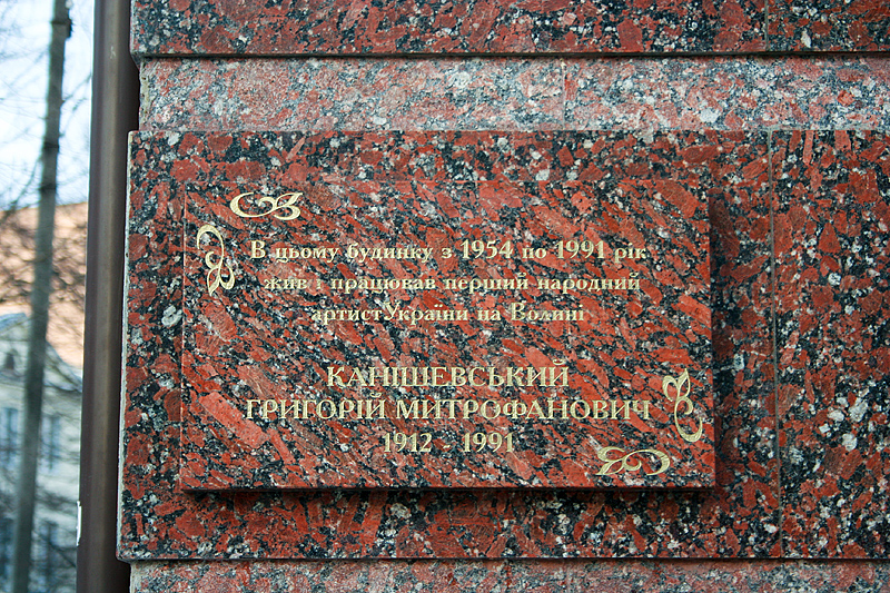 Commemorative plaque in Lutsk